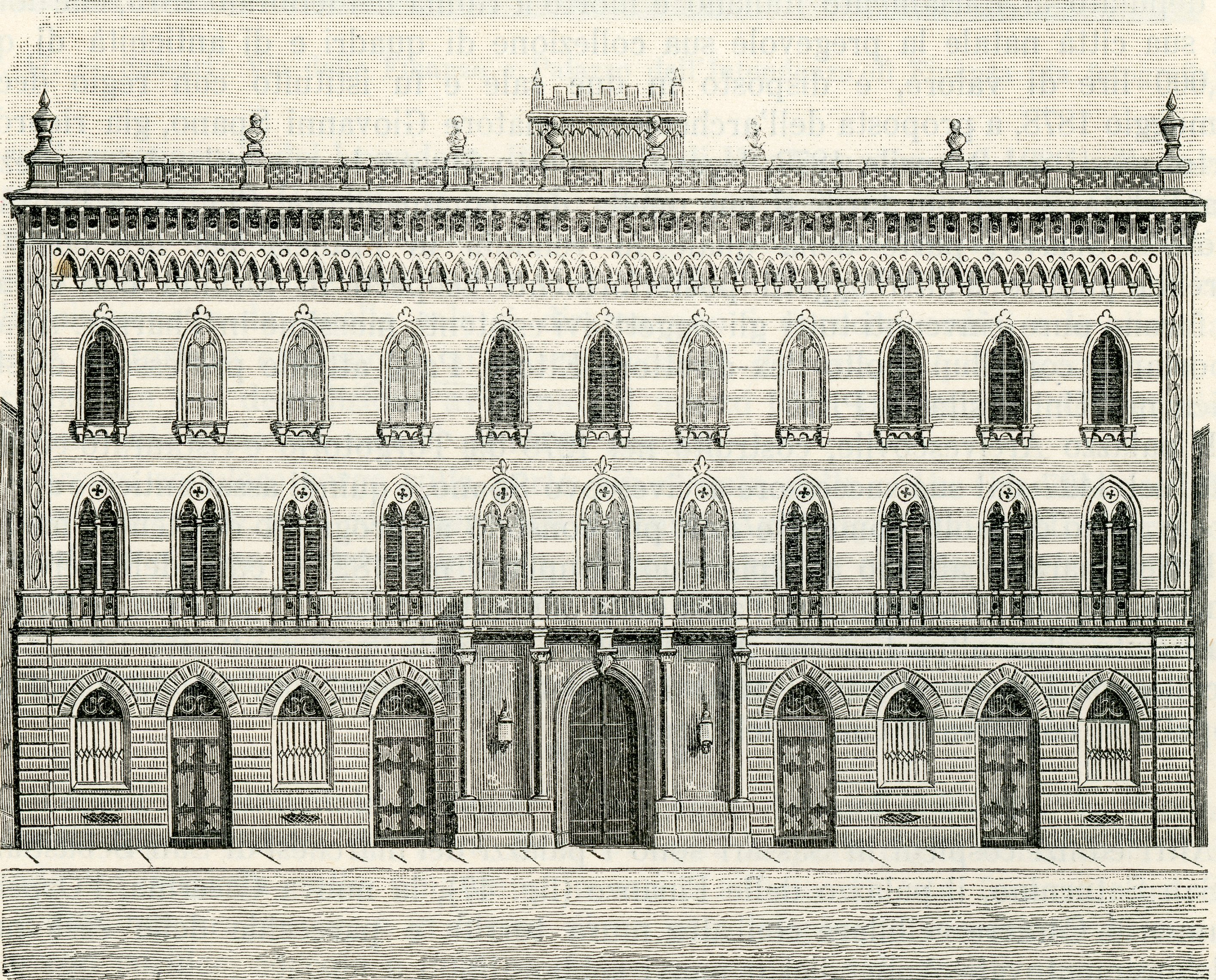 Sassari: palazzo Giordano (incisore anonimo 1894).